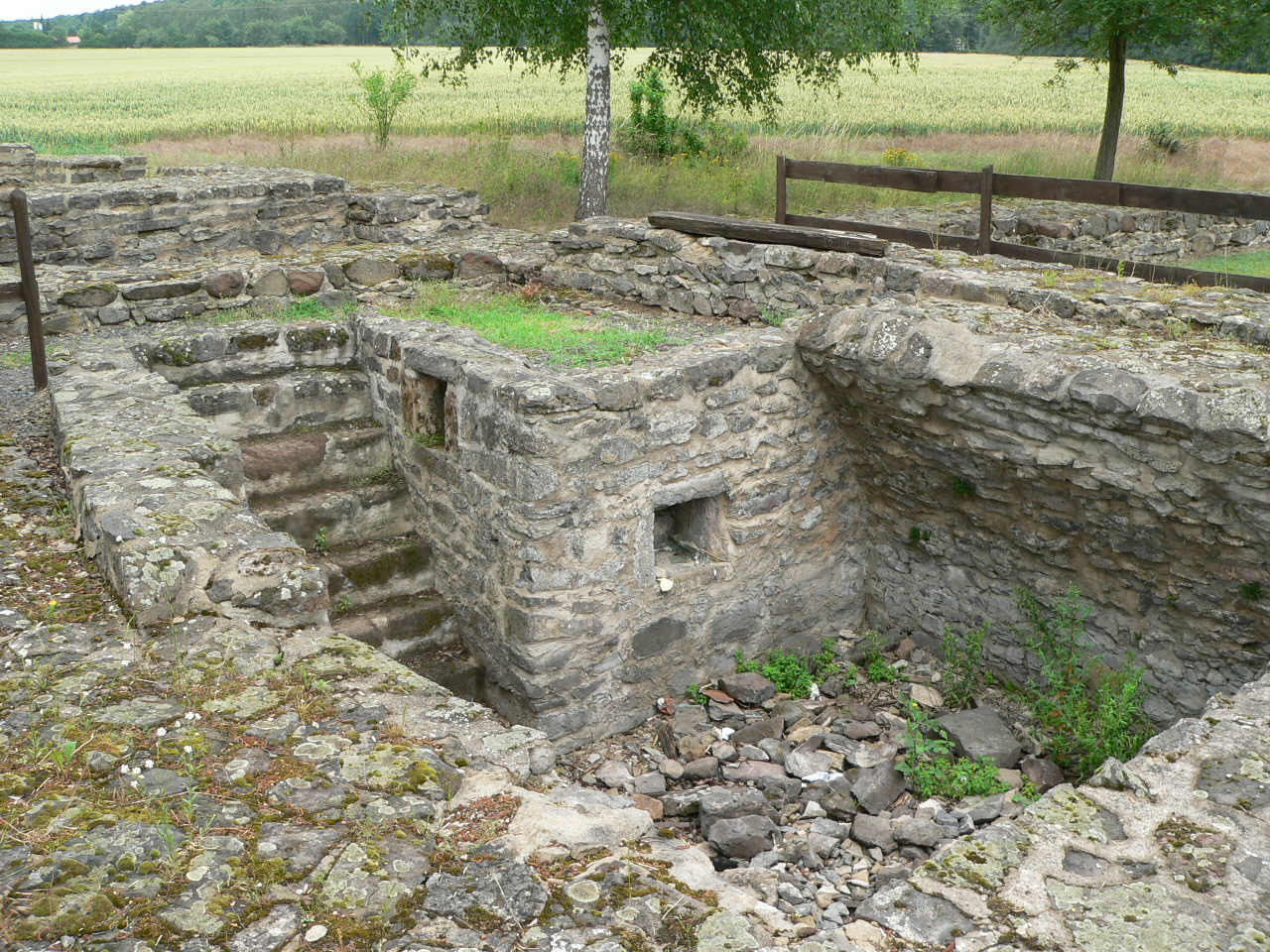 Rekonstruierter Kellerabgang in der Ruine Burg Arnsburg, Hessen, Deutschland.